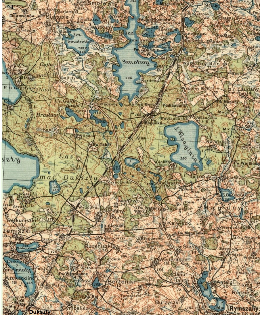 Berżeniki